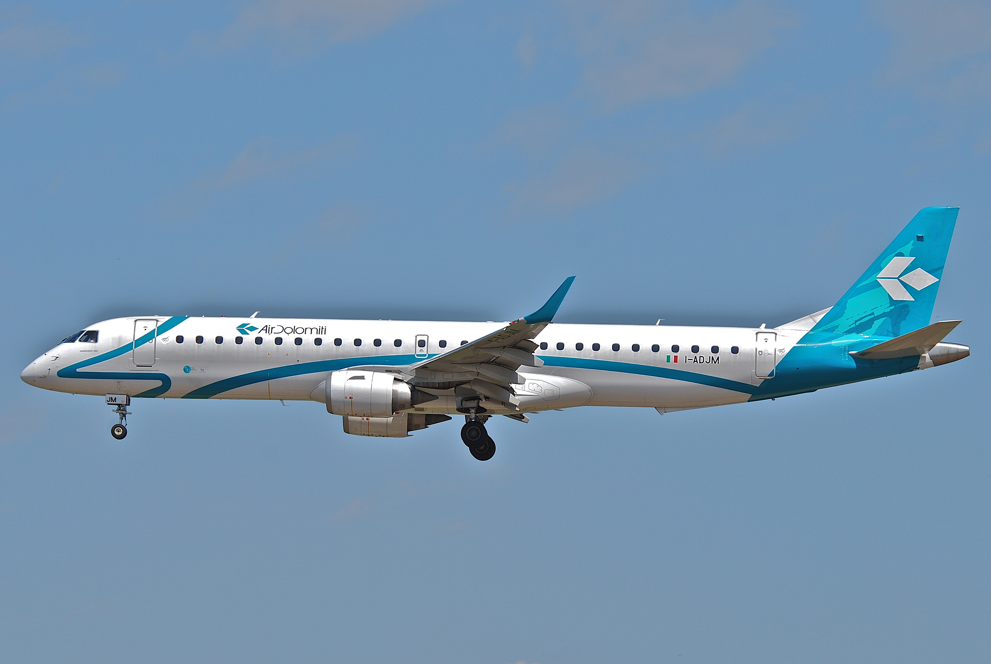 Air Dolomiti Embraer ERJ195; I-ADJM@FRA;06.07.2011/603ka